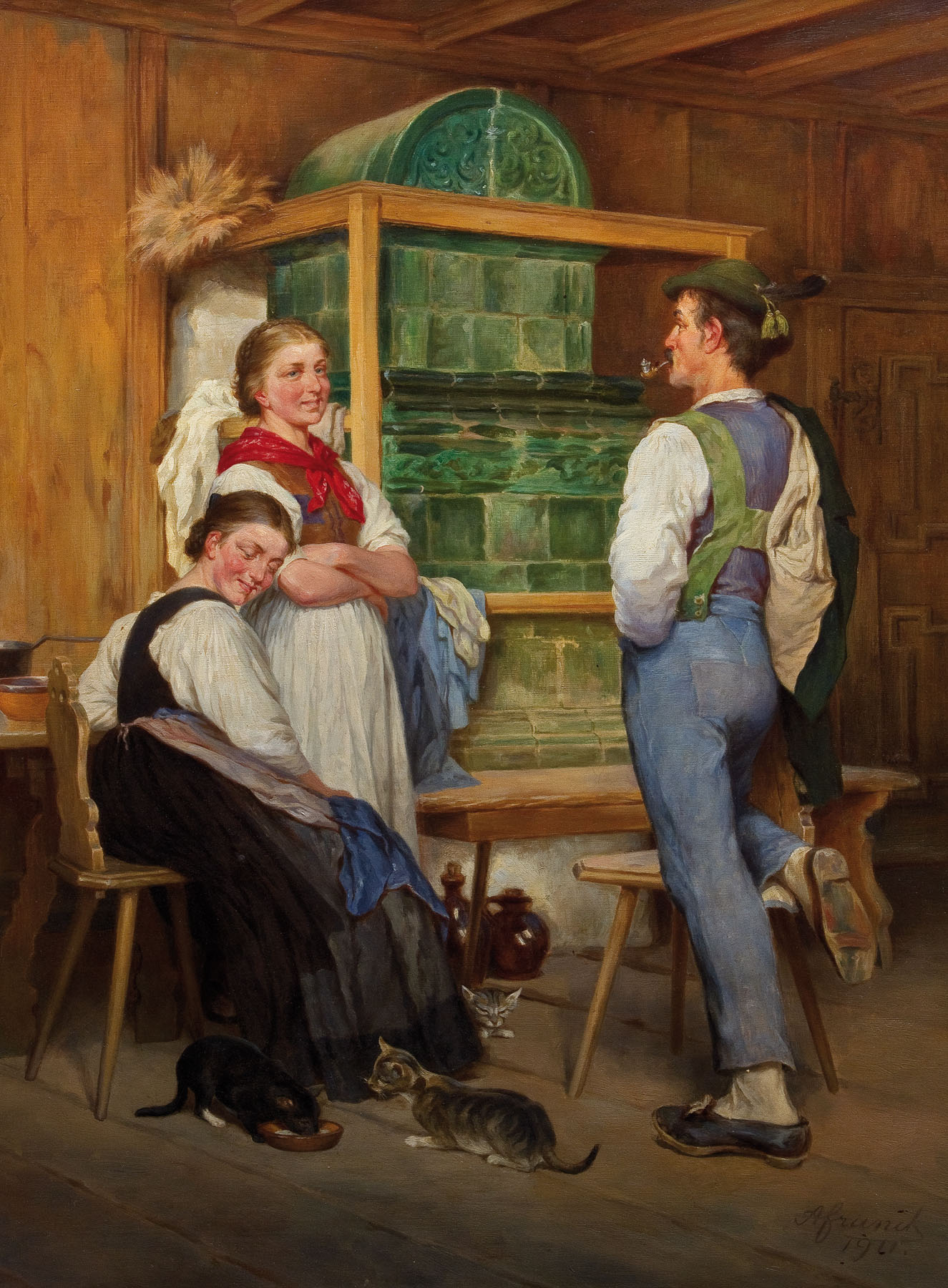 In der guten Stube. Öl auf Leinwand. Unten rechts signiert und datiert A. Franck 1911.. 78 x 60,5 cm